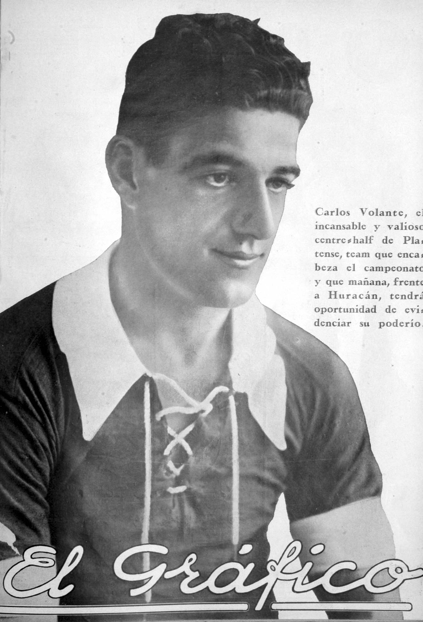 El Grafico del 17 de Mayo de 1930. Edicion 566